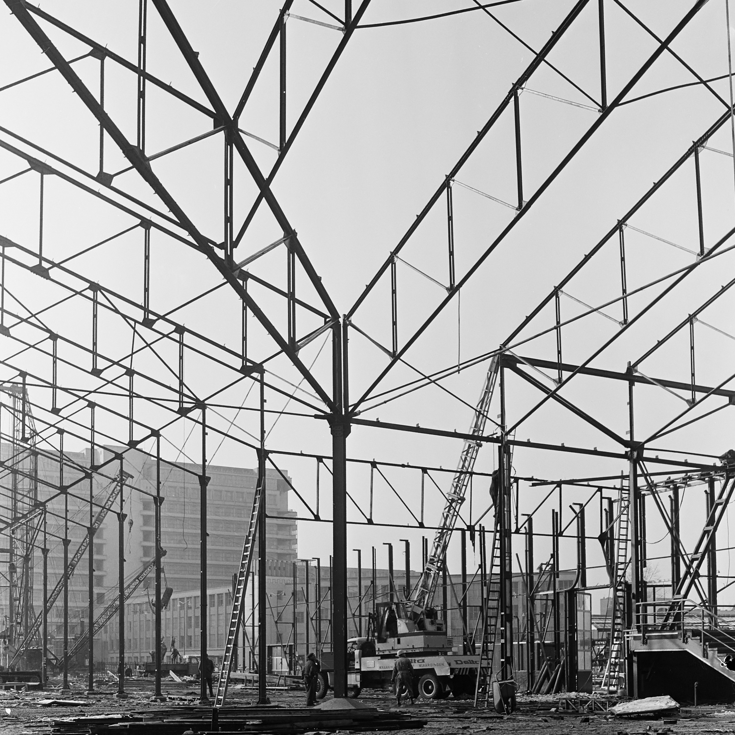 Sloop Ahoy-hallen te Rotterdam, bezig met dakconstructie (lijkend op meccanodoos) 16 februari 1966